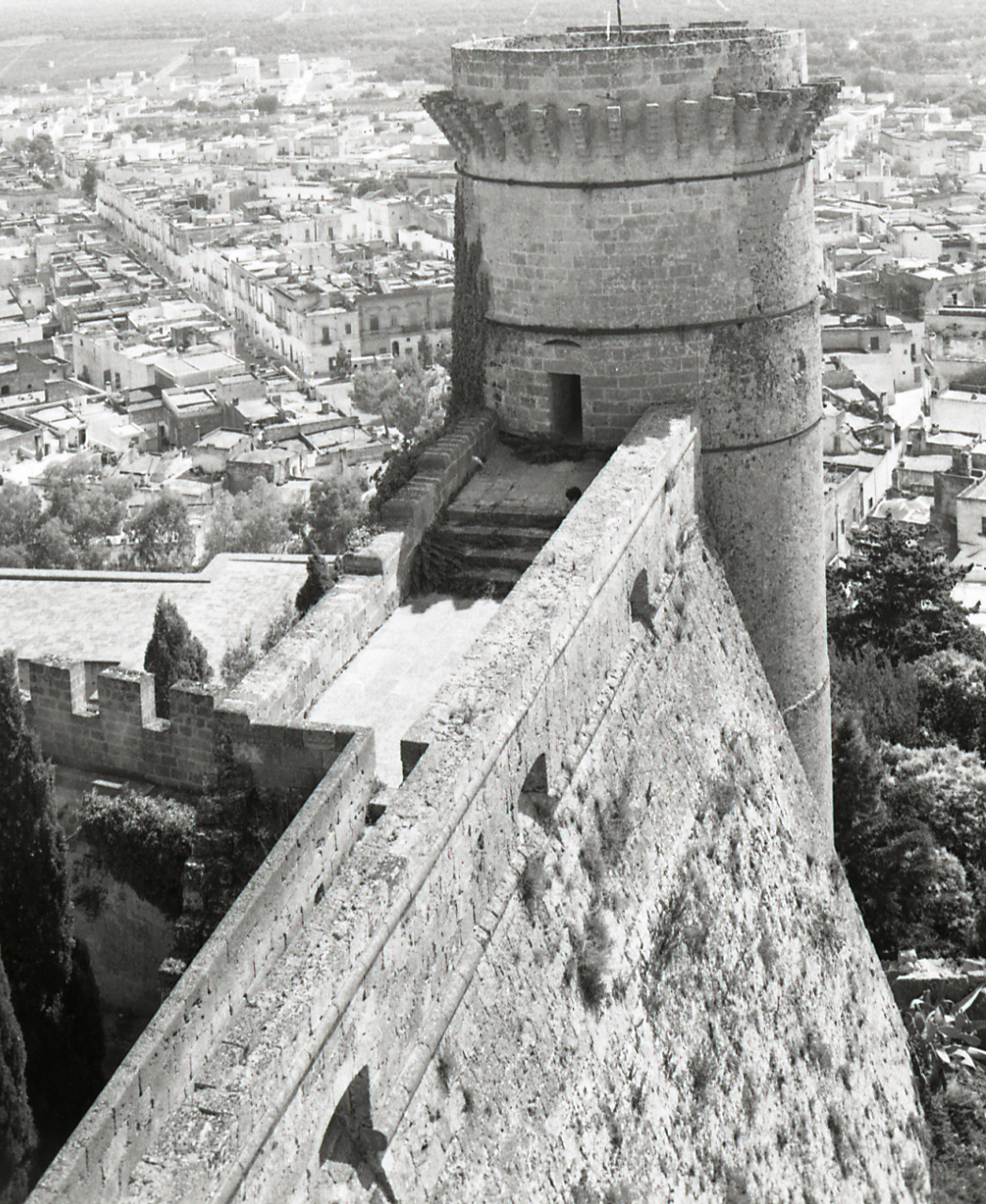 Servizio fotografico : Oria, 1970 / Paolo Monti. - Strisce: 4, Fotogrammi complessivi: 16 : Negativo b/n, gelatina bromuro d'argento/ pellicola ; 35 mm. - ((I fotogrammi hanno una doppia numerazione. . - Sul portanegativi: Nikmat FP4. - Sul dorso del portanegativi Monti specifica: "Castello". - Fonte: Agenda di Paolo Monti: Monti - Agenda 1970 (1970), presso Archivio Paolo Monti